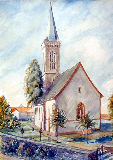 Gemälde der Crainfelder Kirche